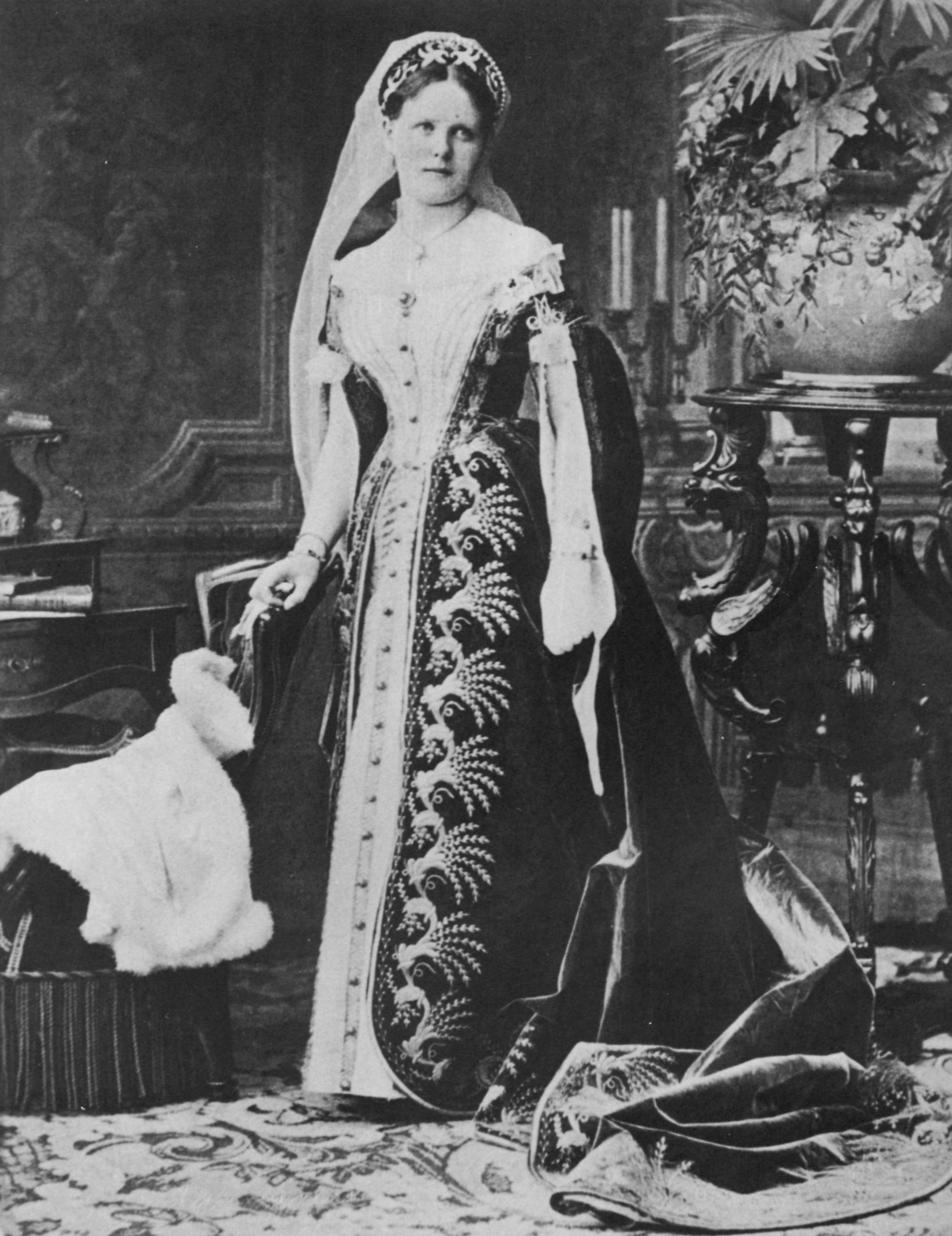 Russischer Photograph: Hofdame in höfischer Tracht [2]